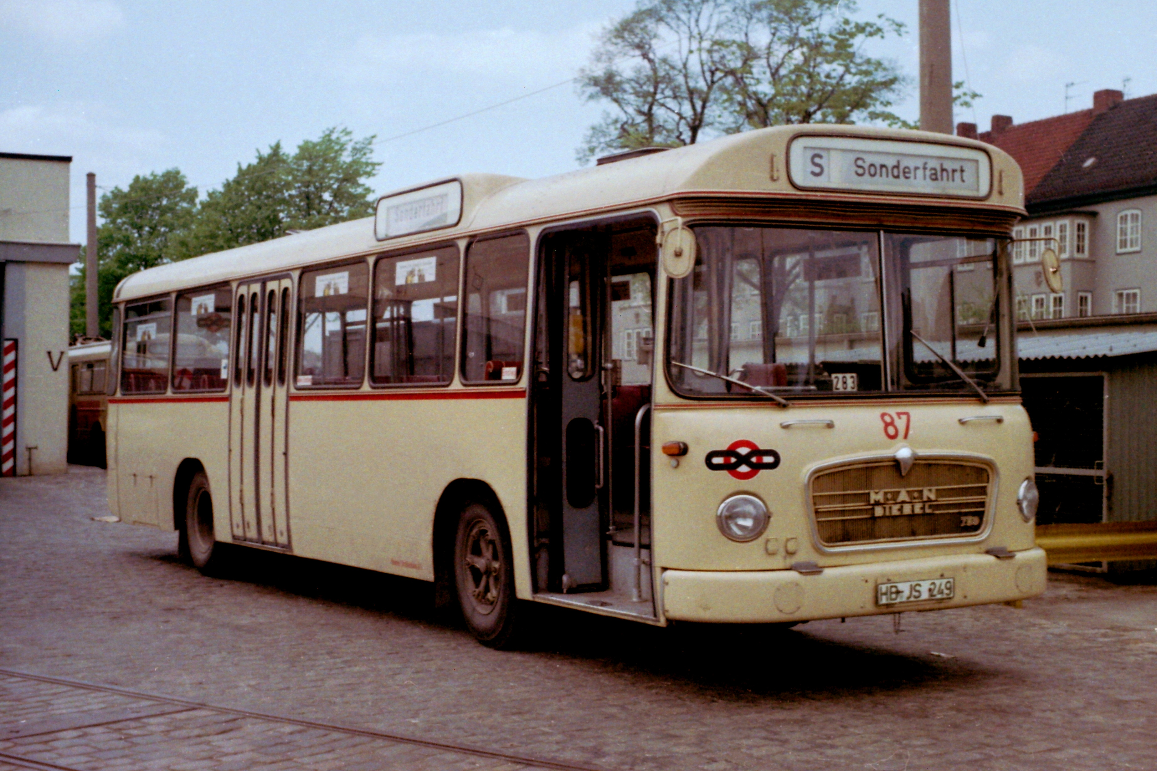 Bremer Straßenbahn AG (BSAG) bus 87 van het MAN type 750 HO in het Depot te Gröpelingen.